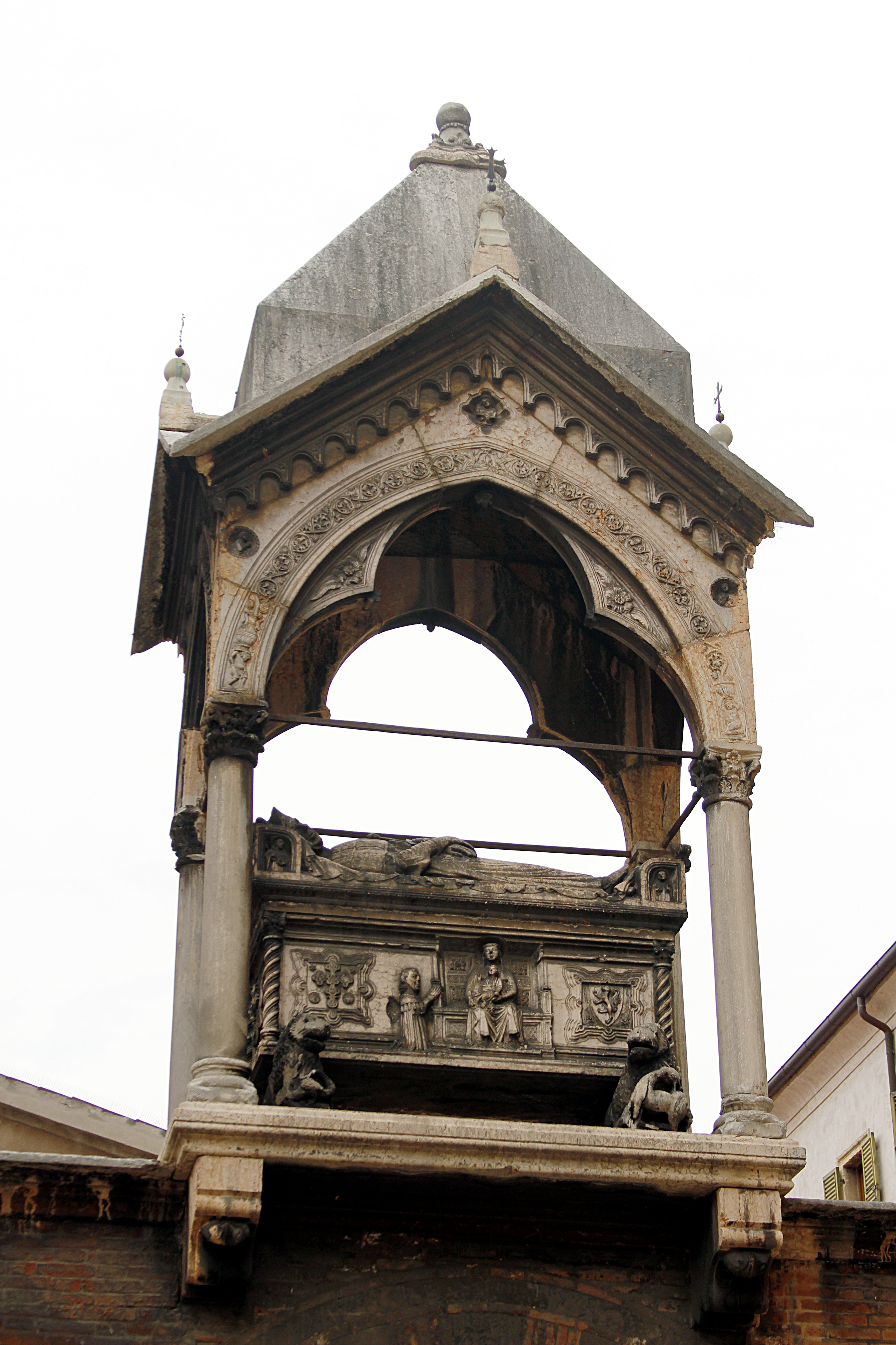 Saint Anastasia (Verona)